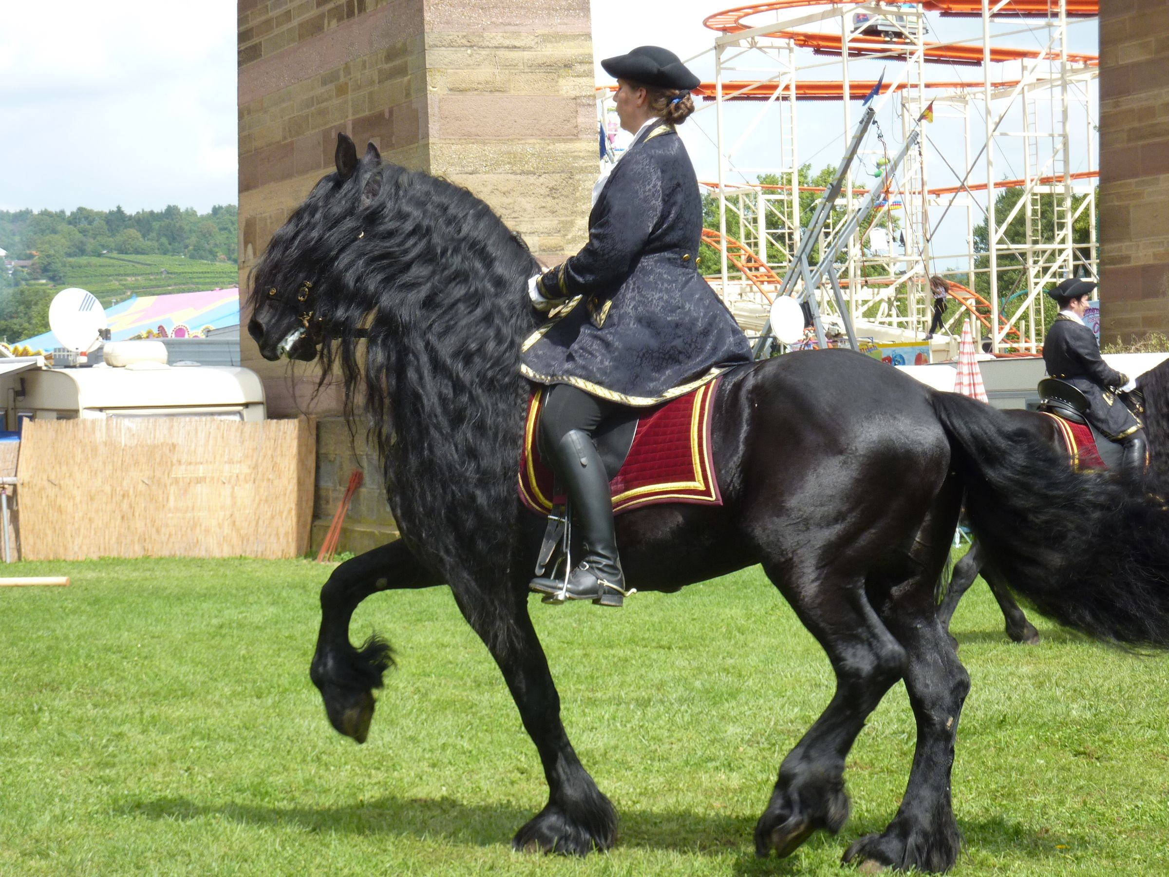 Pferdemarkt Bietigheim